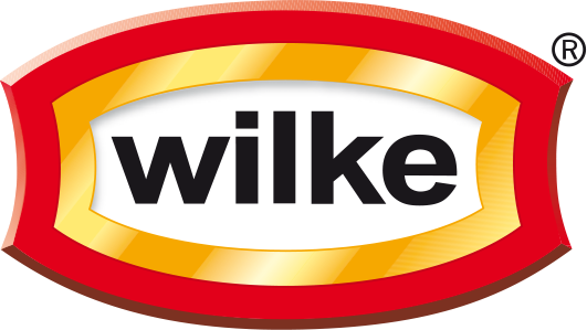 Logo von Wilke Waldecker Fleisch- und Wurstwaren